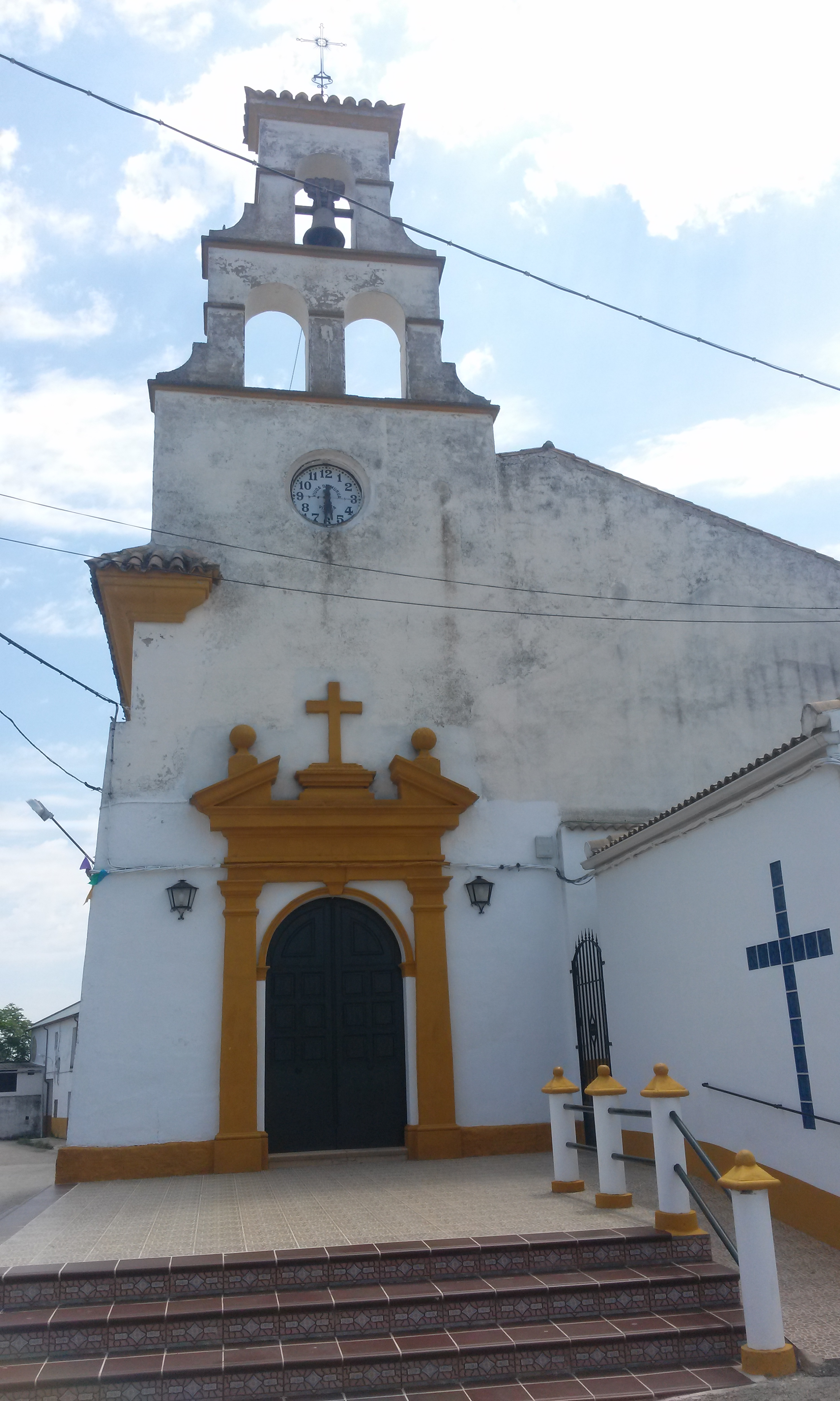 Iglesia de Santa Catalina, Espelúy.